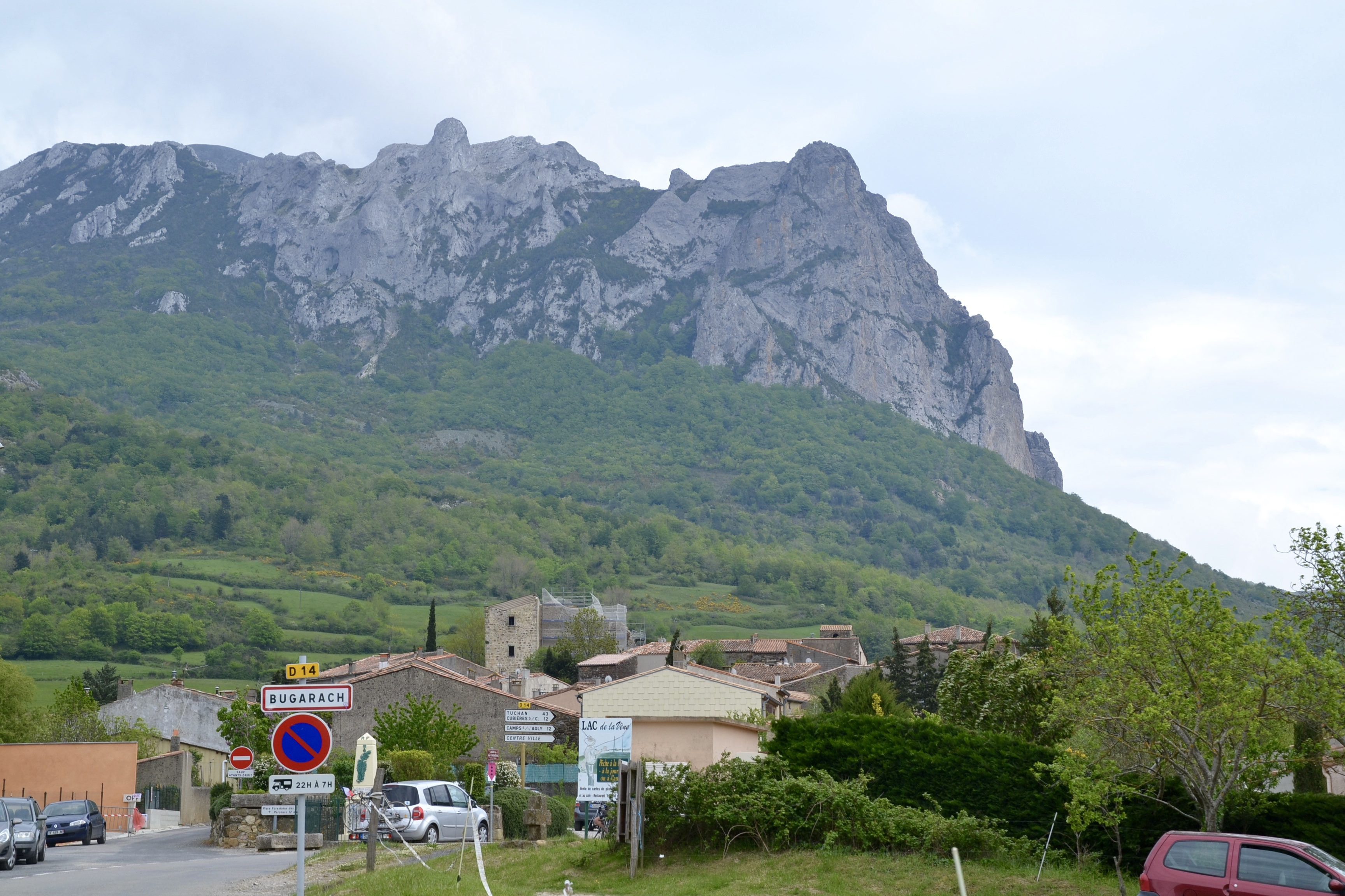 Entrée du village de Bugarach (Aude, France), devant le pech de Bugarach.